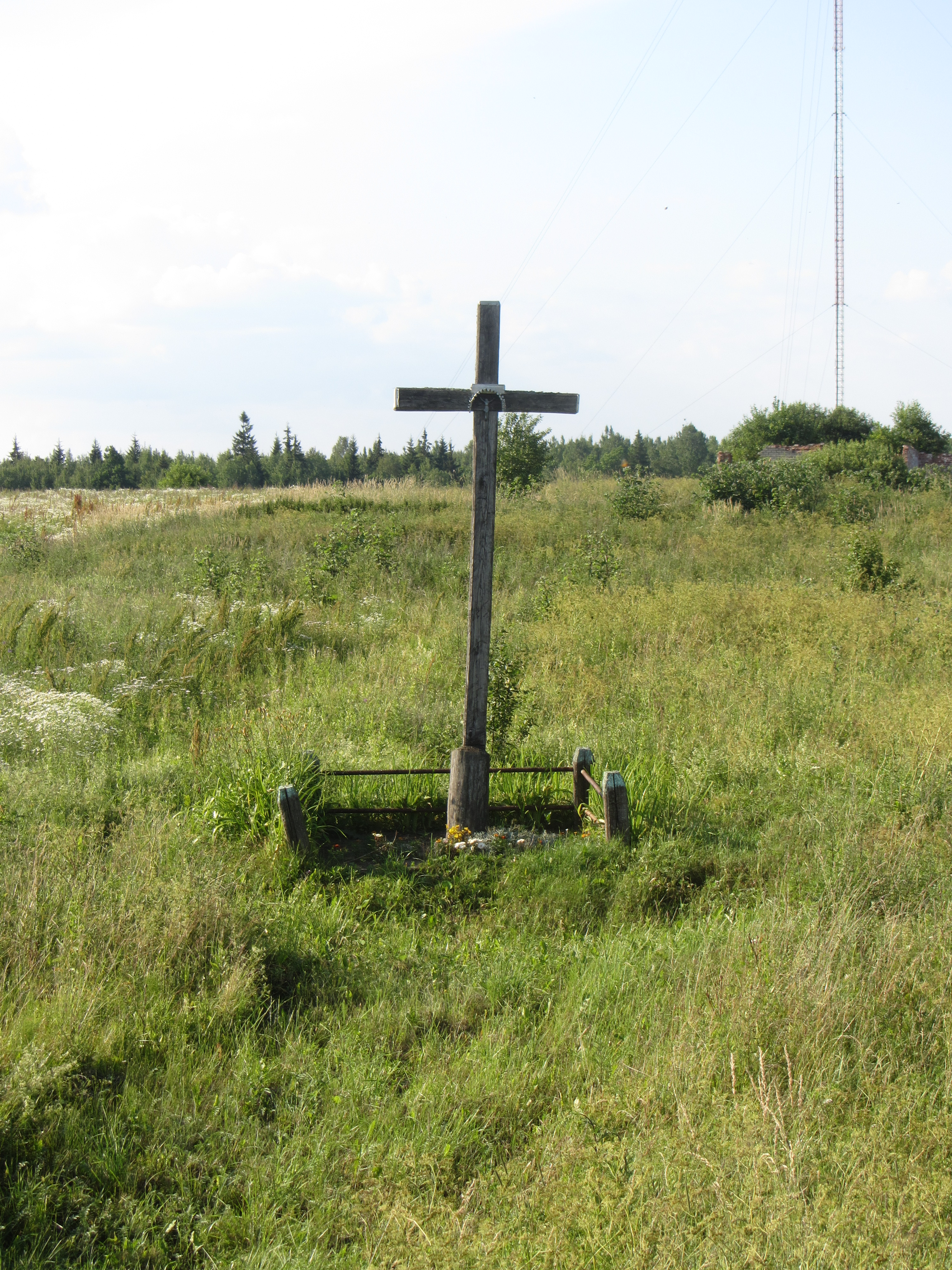 Sakališkė I 18266, Lithuania